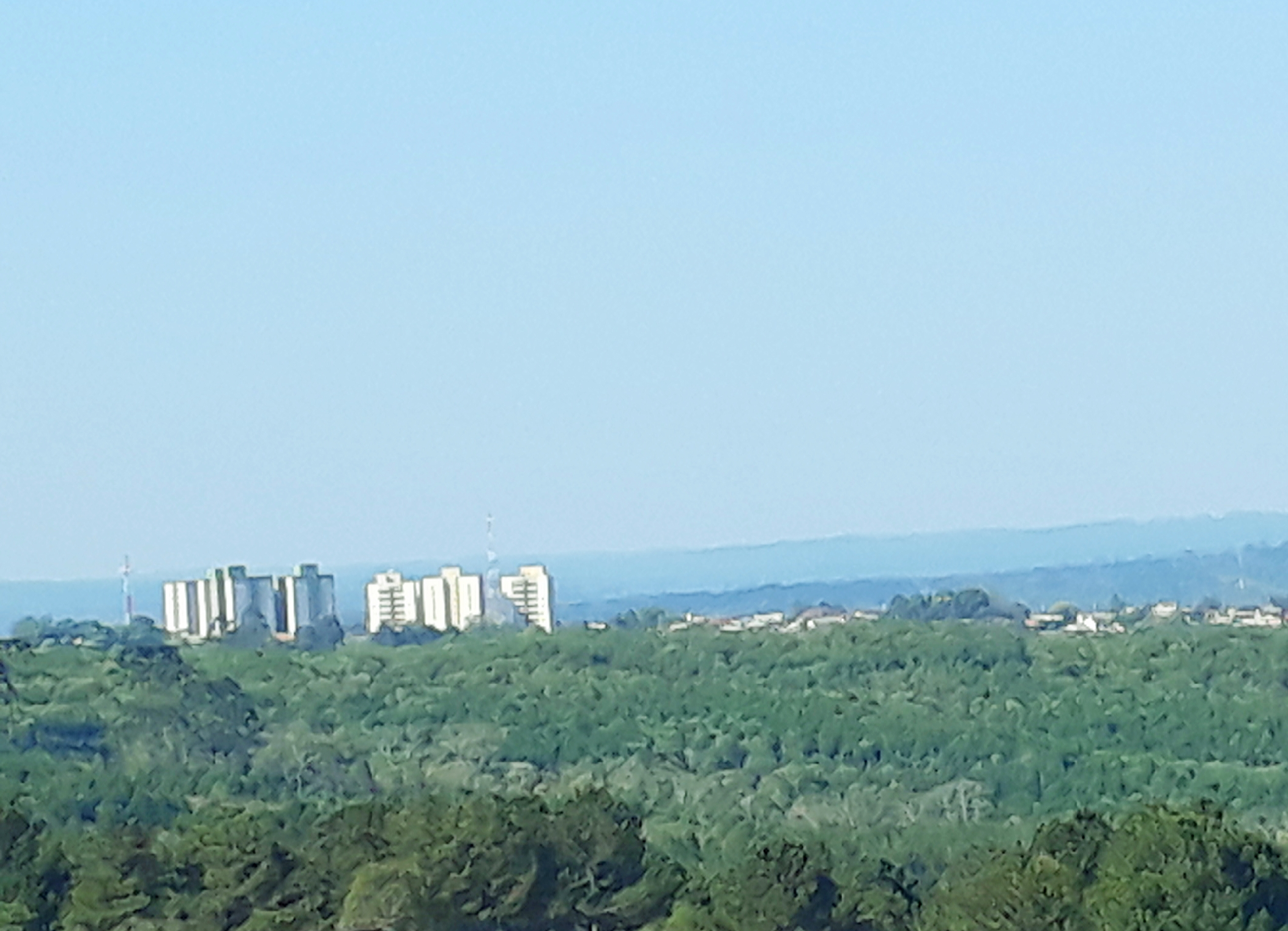 Vista parcial da cidade de Telêmaco Borba partir do distrito industrial do município.